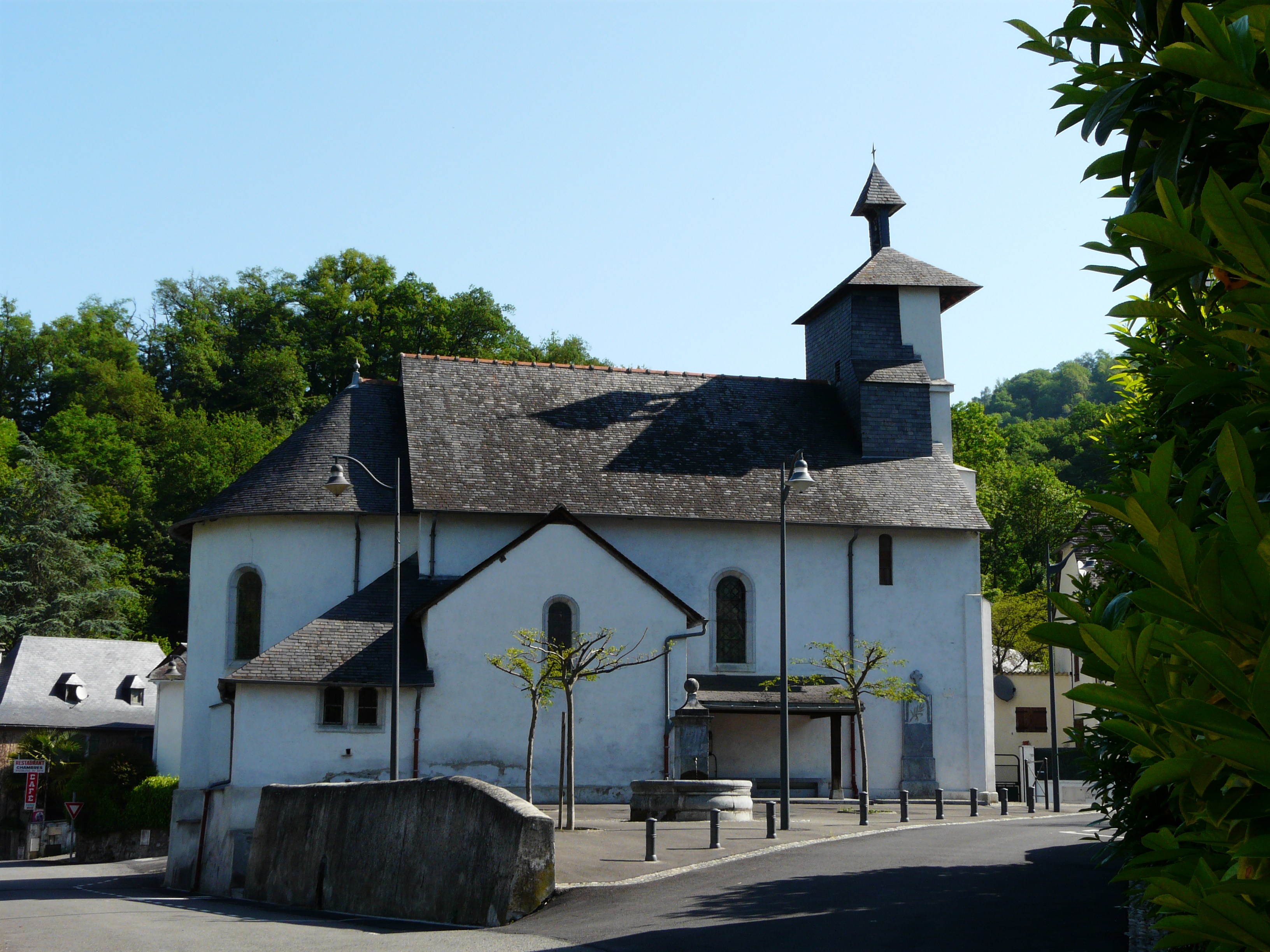 Le côté sud de l'église Saint-Gilles, Ger, Hautes-Pyrénées, France.